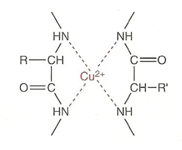 Schéma du complexe entre le cuivre alcalin et les ions peptidiques